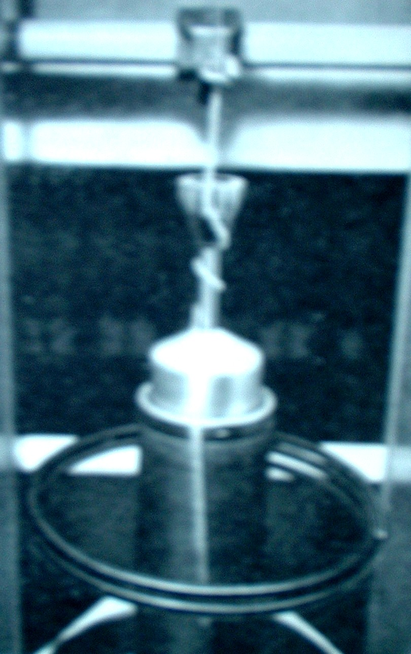 Ringspindel mit Spinnkrone